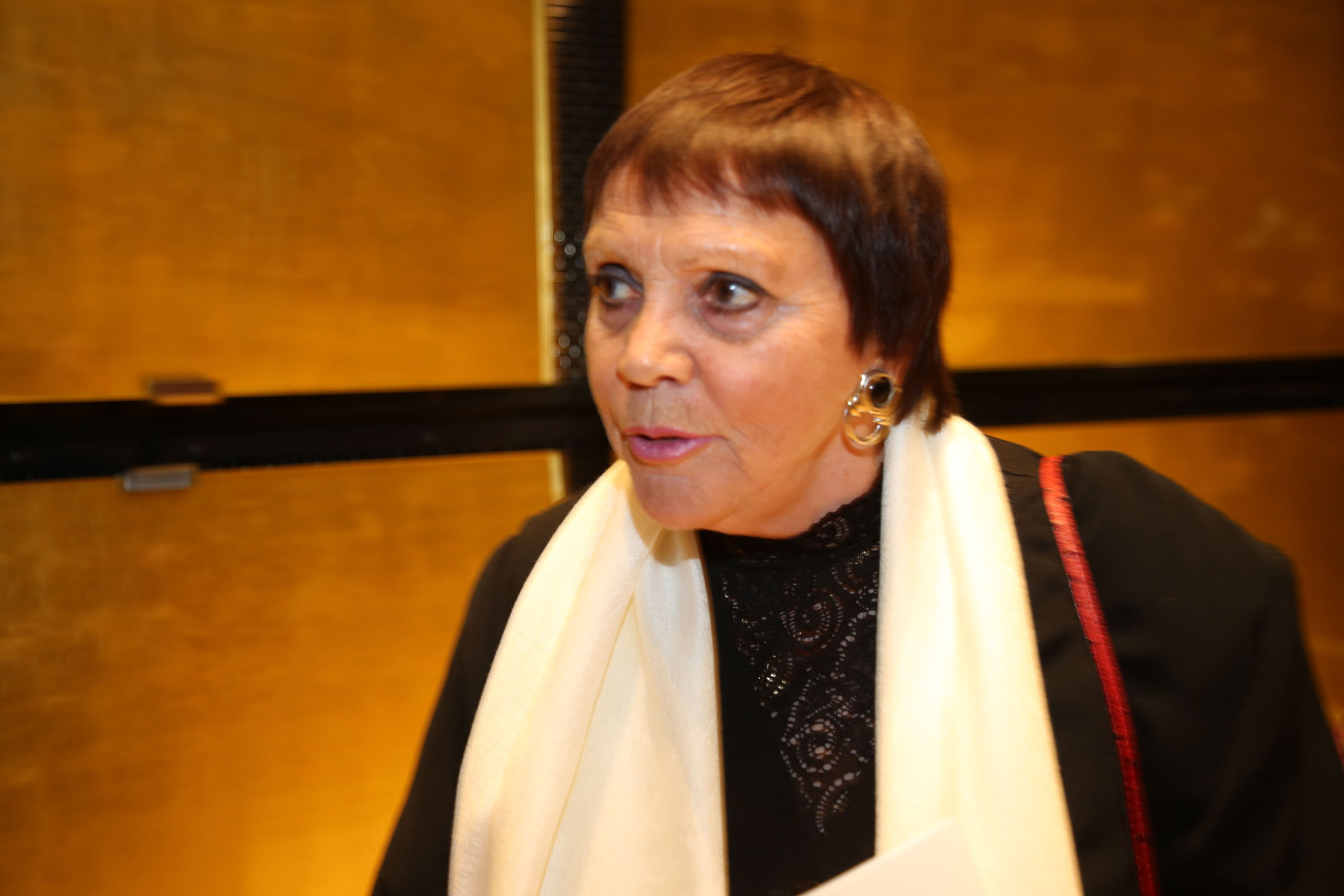 KS Brigitte Fassbaender, Juryvorstand beim Hilde Zadek Gesangswettbewerb